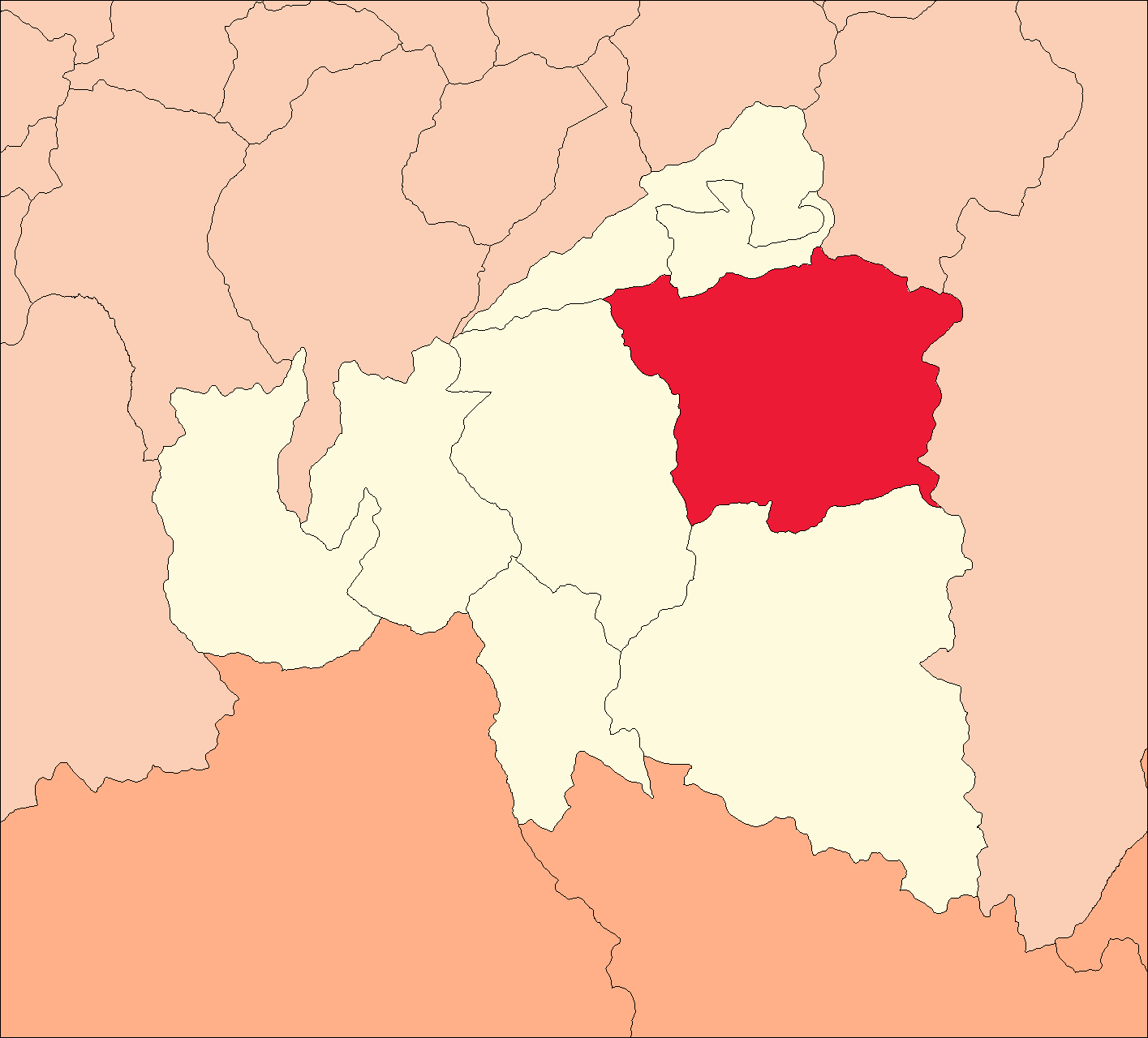 Área del distrito de Ambo.